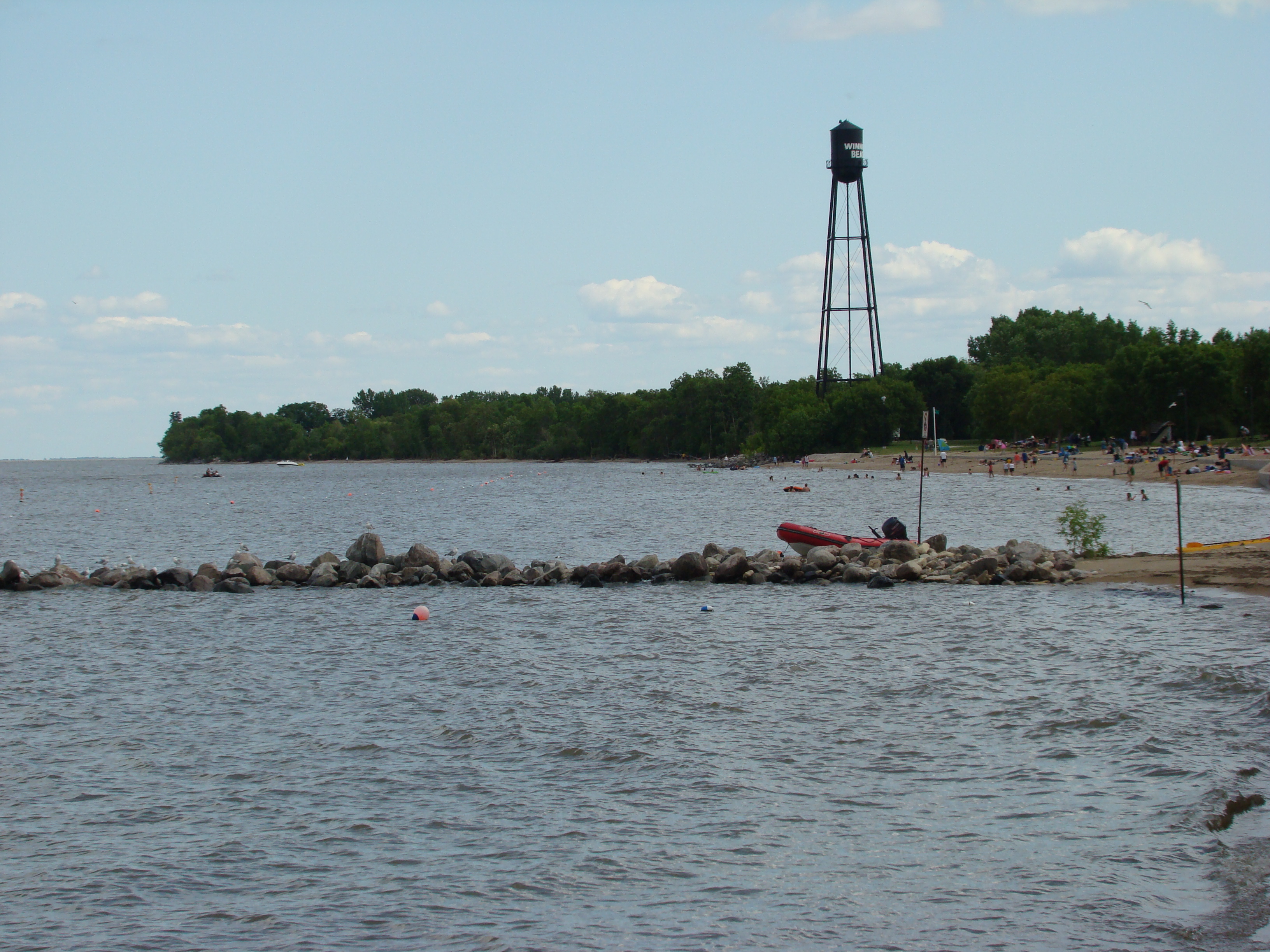 Winnipeg Beach Manitoba Canada 2009